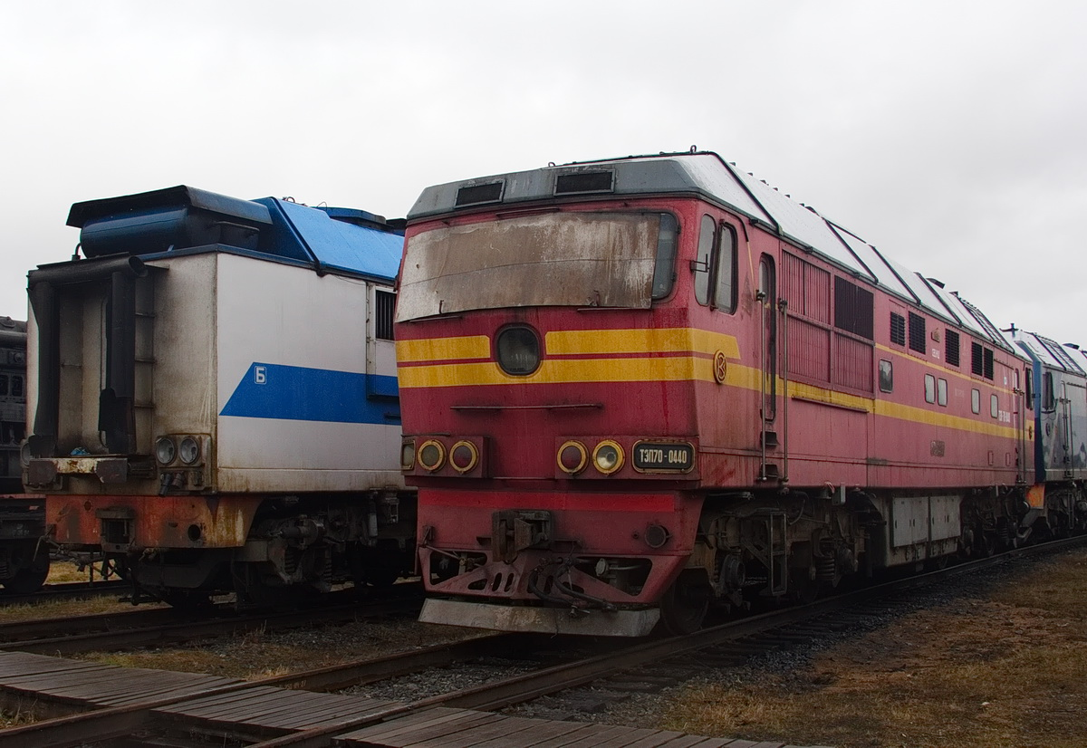 Тепловоз ТЭП70-0440 и секция тепловоза 2ТЭ70 с задней стороны Депо Сольвычегодск, Архангельская область, Россия